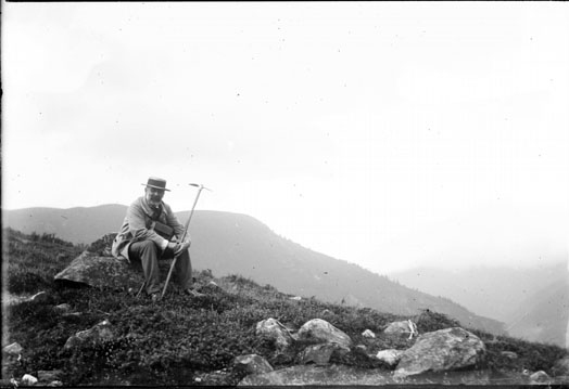 Auto-portrait d'Eugène Trutat, "Ego sur le fauteuil de presse" Fonds Trutat - Photographie ancienne Cote : TRU C 4 Localisation : Fonds ancien Original non communicable Titre : Ego sur le fauteuil de presse, [autoportrait d'Eugène Trutat], Luchon-Lespiault, septembre 1897, [prise à l'objectif Turillon] Auteur : Trutat, Eugène Rôle de l’auteur : Photographe Lieu de création : Bagnères-de-Luchon (Haute-Garonne ; canton) Date de création : : 1897 Mesures : 7 x 9 cm Mot(s)-clé(s) : -- Homme -- Montagne -- Chapeau -- Randonnée pédestre -- Alpinisme -- Costume masculin -- Piolet -- Trutat, Eugène -- Bagnères-de-Luchon (Haute-Garonne ; canton) -- Pyrénées (France) -- 19e siècle, 4e quart Médium : Photographies -- Négatifs sur plaque de verre -- Noir et blanc -- Portraits -- Autoportraits Bibliothèque municipale de Toulouse. Domaine public